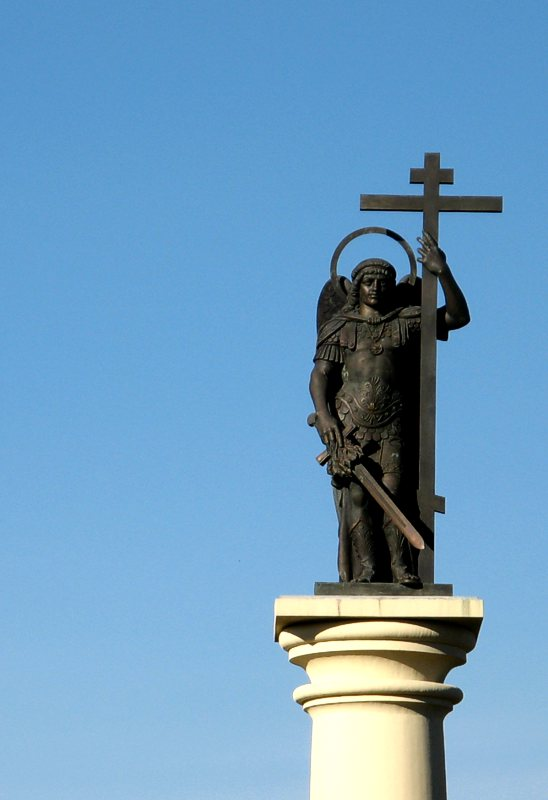 Monument ro Archangel Michael. Sochi